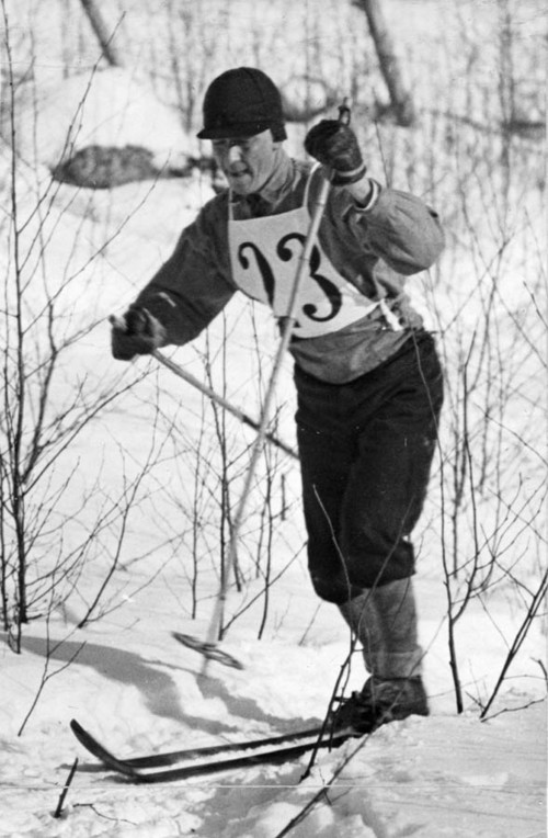 Veli Saarinen